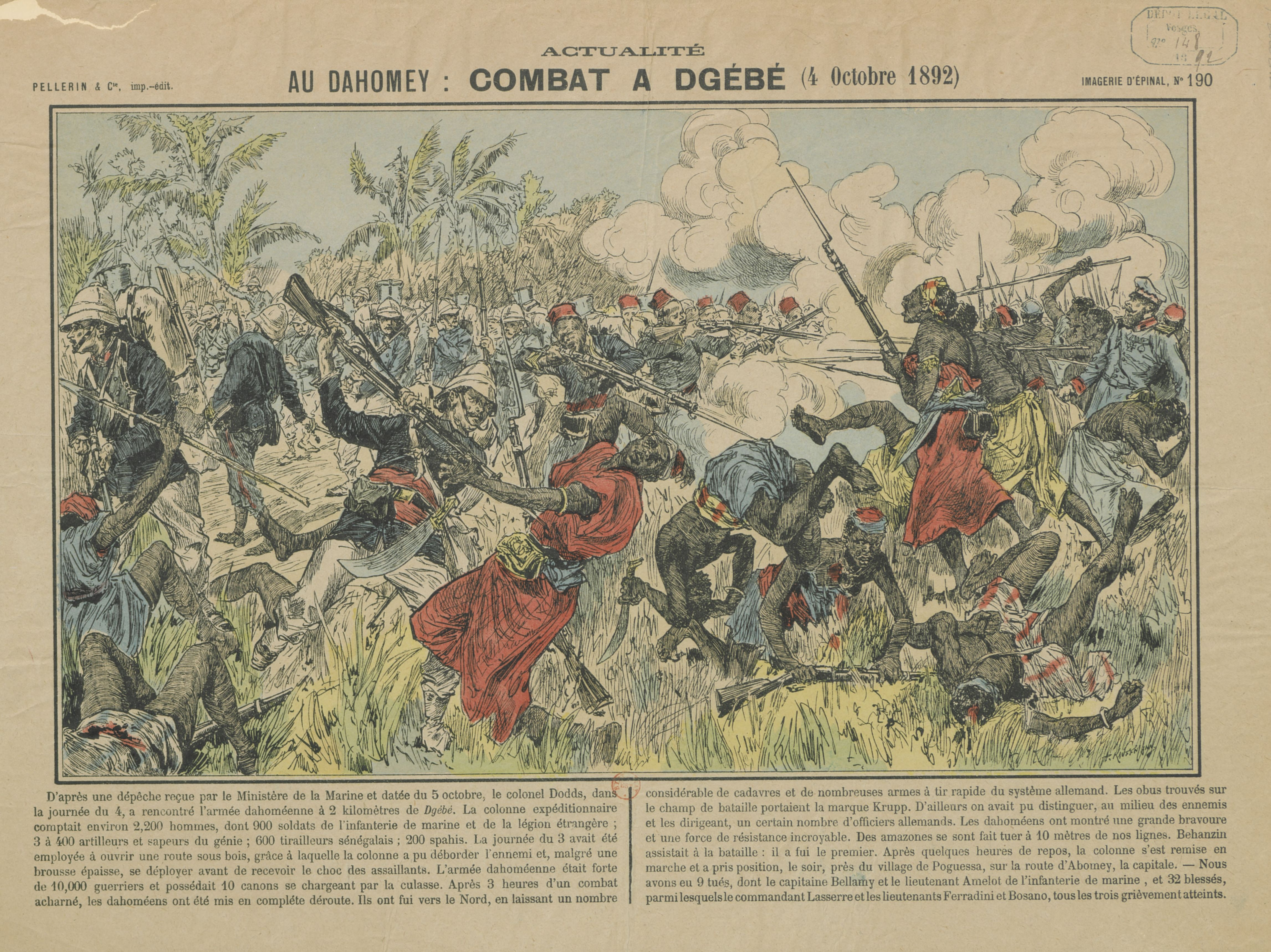 Imagerie d'Epinal. N° 190, Actualité. Au Dahomey : Combat à Dgébé (4 octobre 1892) : [estampe] / P. Kauffmann. Pellerin et Cie, imp.-édit. [Epinal, 1892]